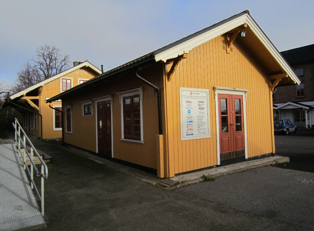 Lier gamle stasjon i Lierbyen